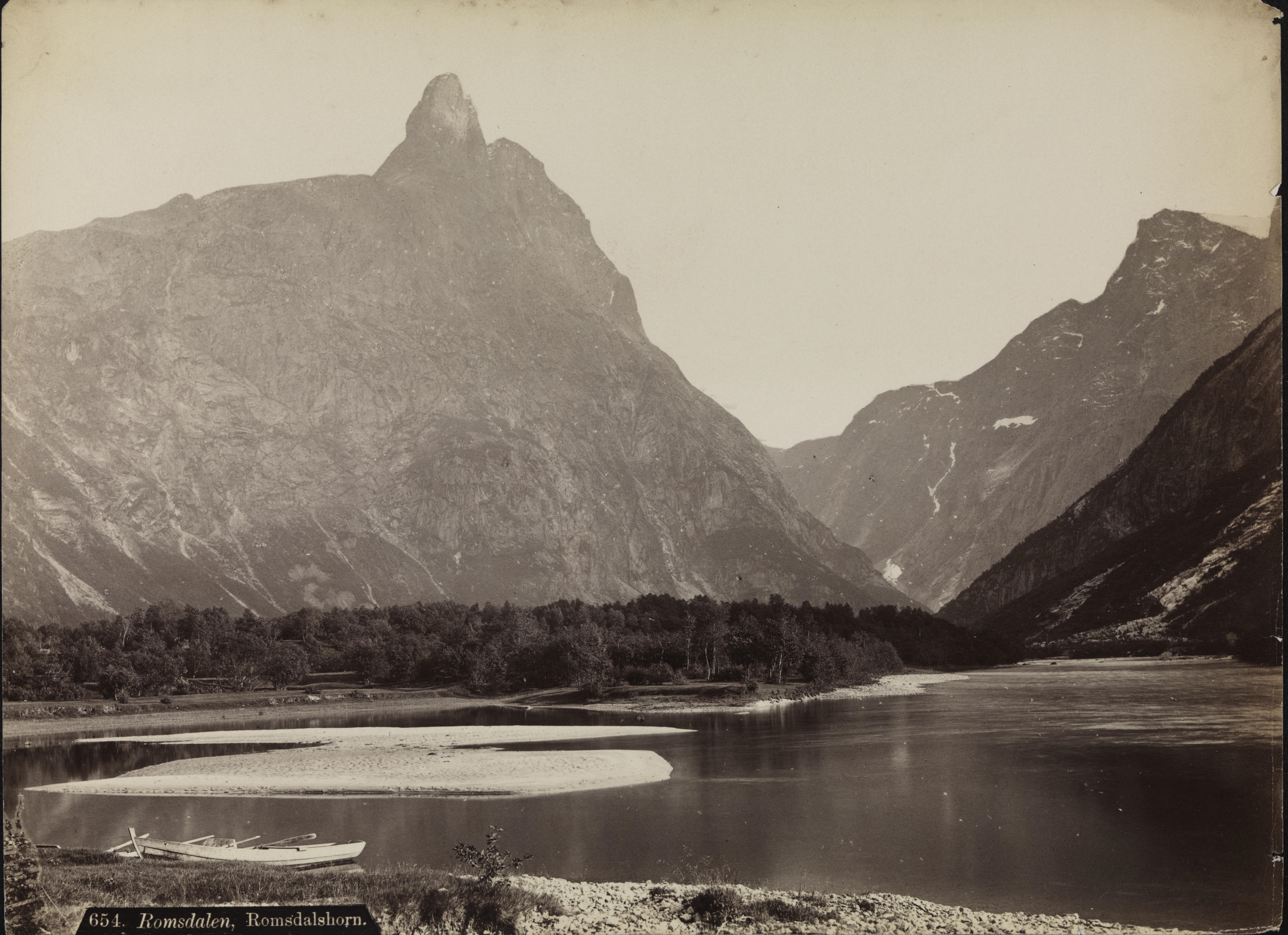 Bildet er hentet fra Nasjonalbibliotekets bildesamling Romsdalshorn, Rauma, Møre og Romsdal. Beskåret for penere visning